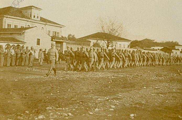 Slovesni mimohod 87.pešpolka ob prihodu v Skader.